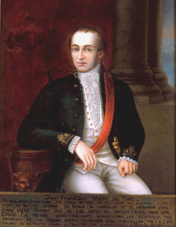 los gobernadores de Chile (pre 1817), forma parte de la coleccion de retratos de los gobernadores de Chile. La Colecciòn de Retratos de los Presidentes del Coloniaje. The collection of Portraits of the Governors of Chile is in the Museo Histórico Nacional (Chile) and was commissioned by Benjamín Vicuña Mackenna for the 1873 Colonial Exhibition and painted by various artists. It replaces a series of portraits of Chile's colonial governors dating from the colonial era which was destroyed during the wars for independence. [1].